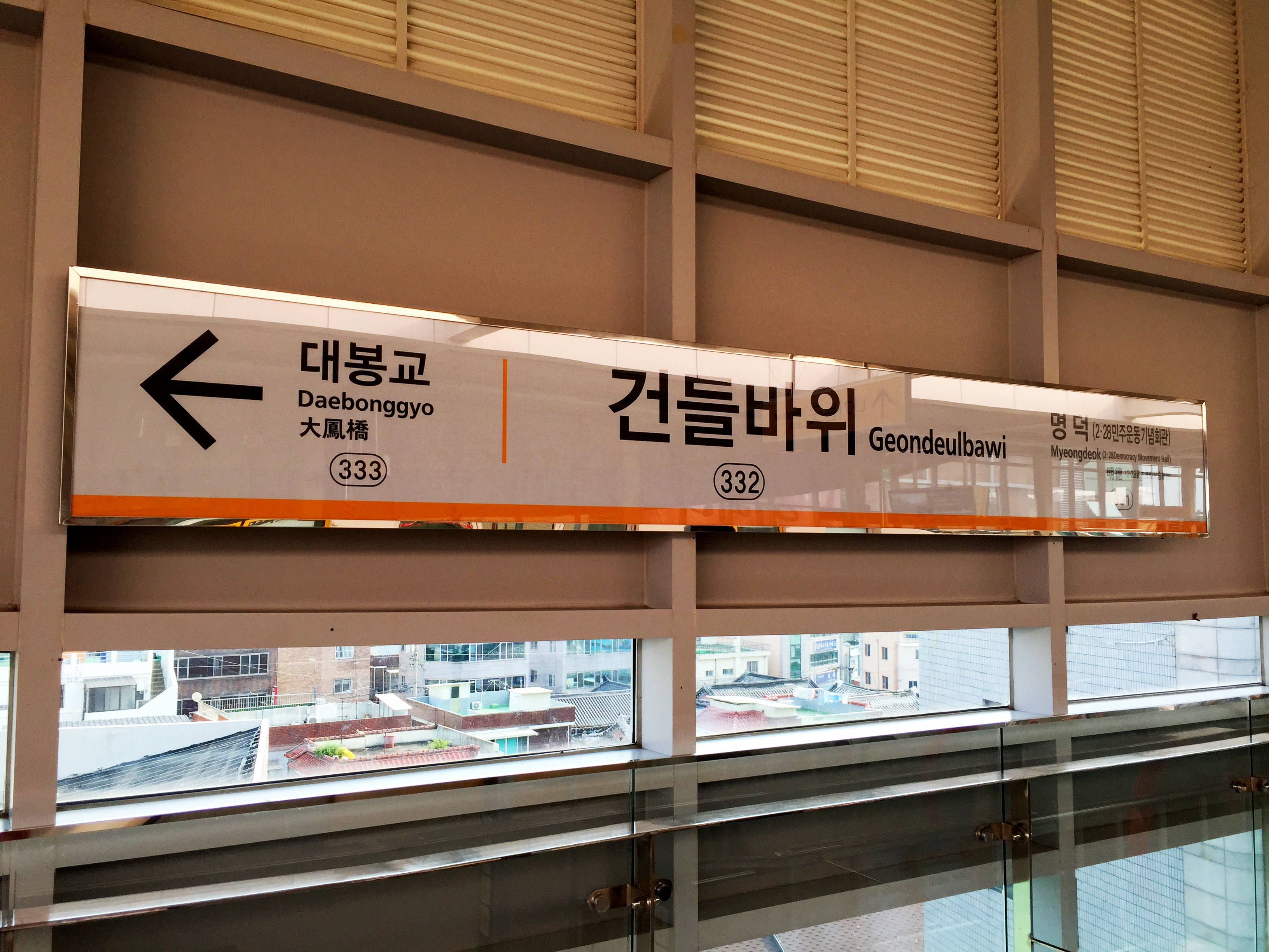 건들바위역 역명판